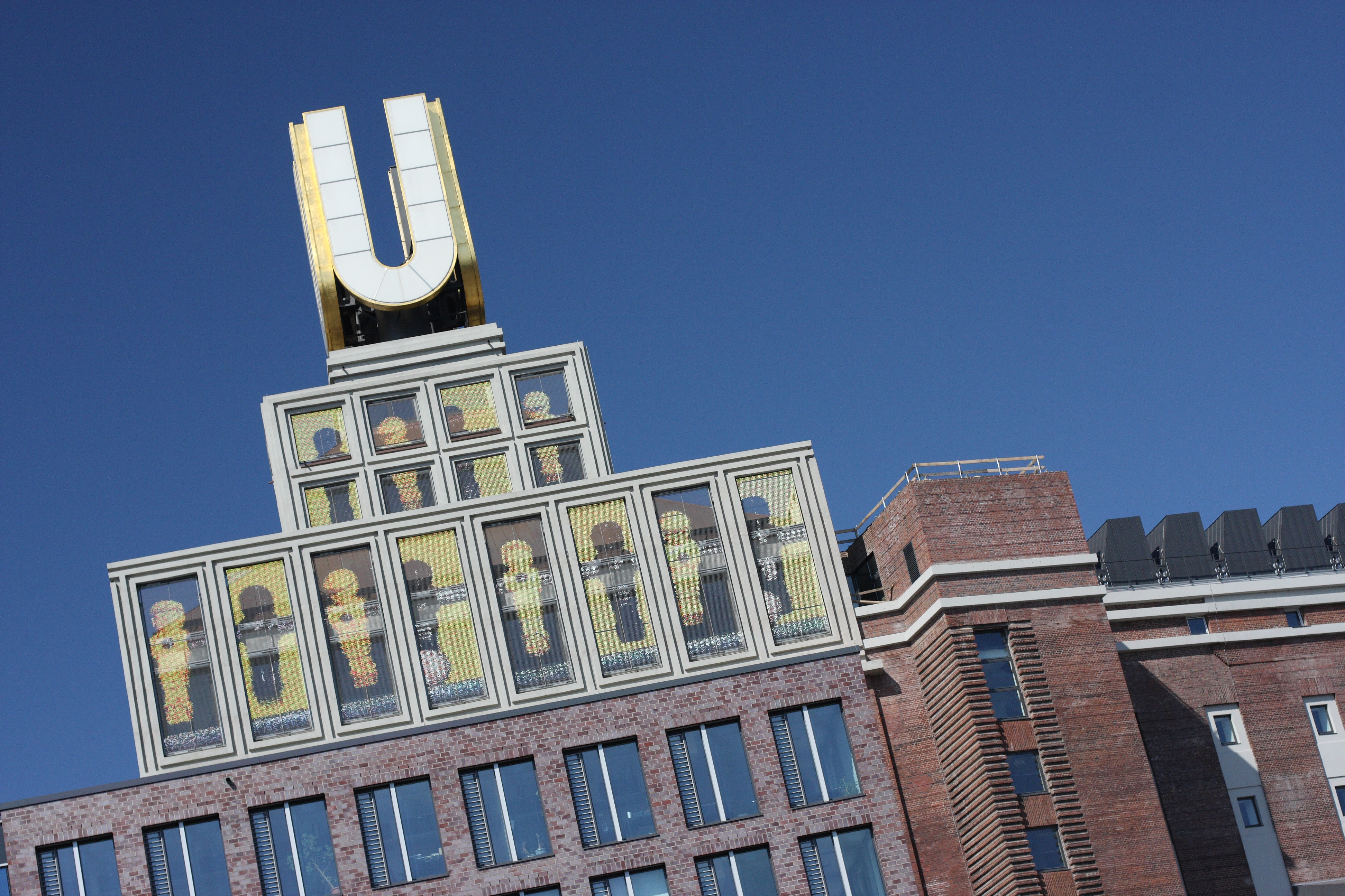 Dortmunder UThis is a photograph of an architectural monument. 0662